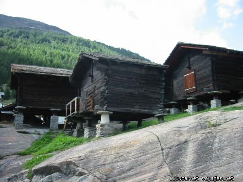 Description: Vestiges de mazots dans le centre de Saas Fee. Auteur: juju ( Site: Url de la photo